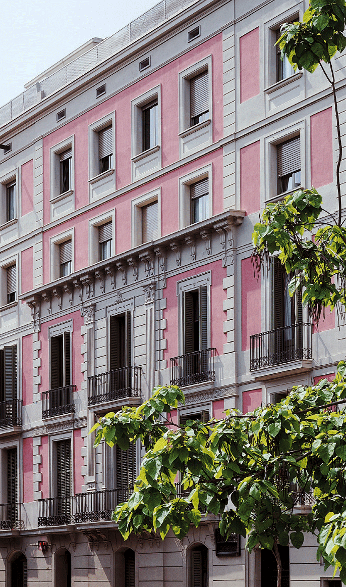 Façana de l'Arxiu Maragall